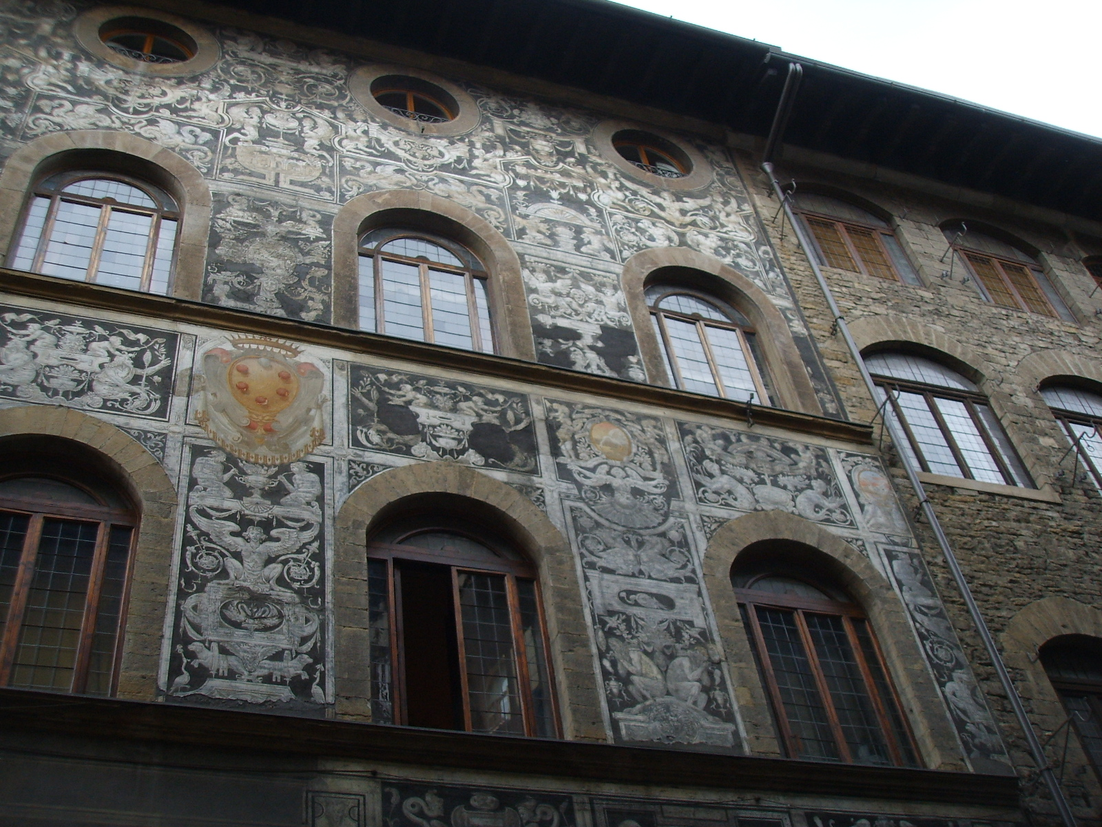 Palazzo di bianca cappello, graffiti